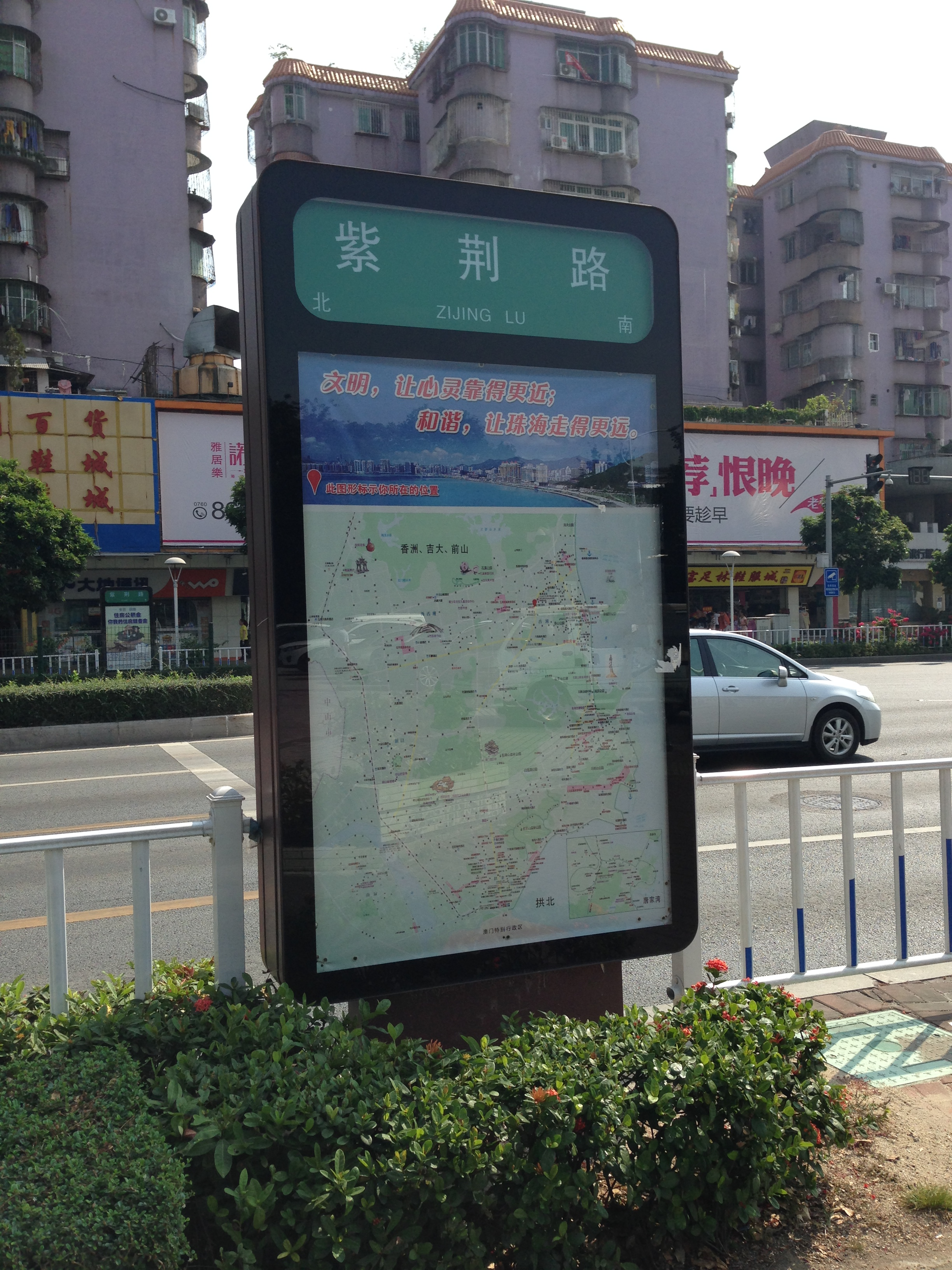 珠海紫荆路